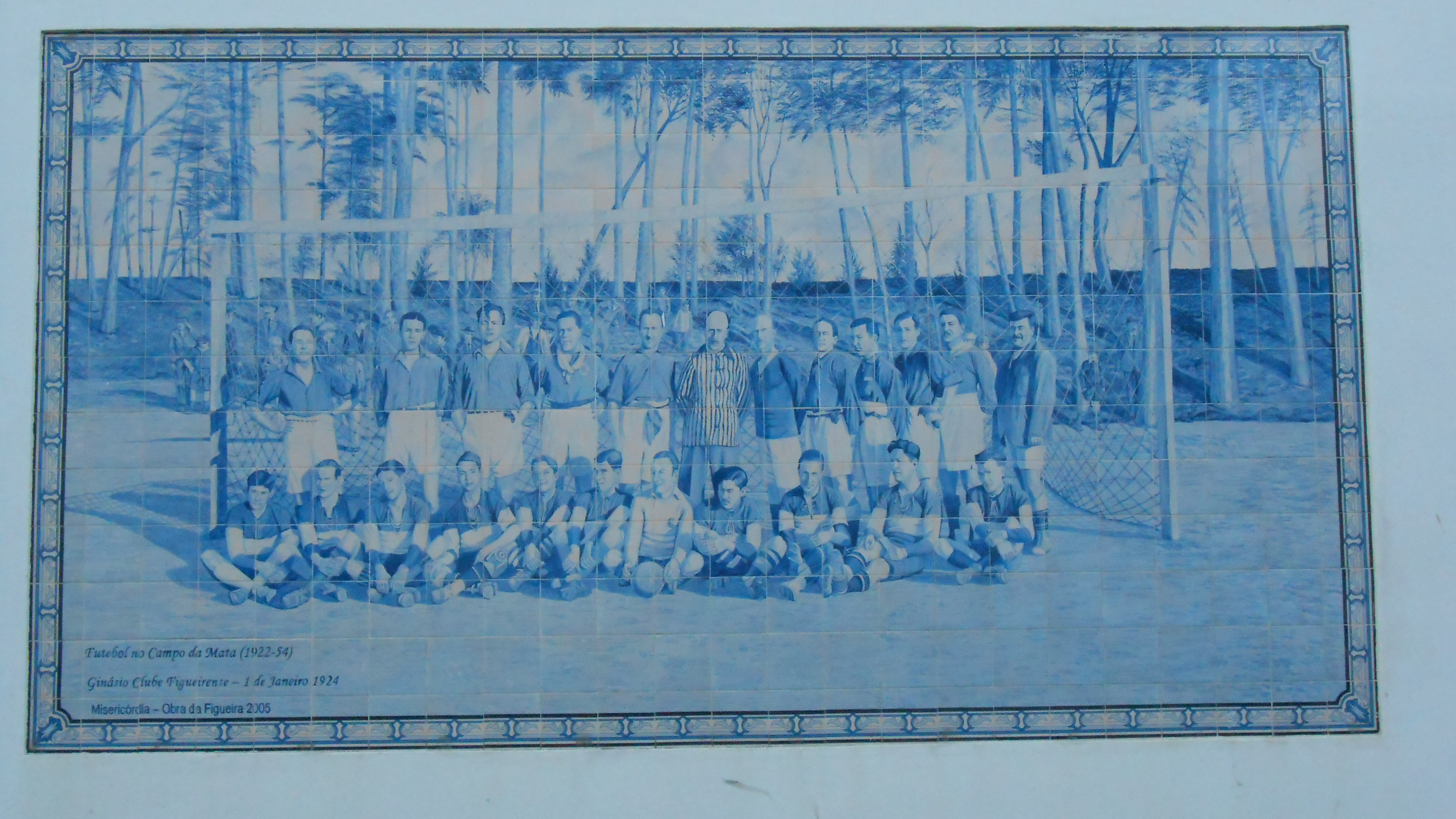 Azulejo-Bild des Ginásio Clube Figueirense, eines von mehreren Themenbildern der Stadt an der Außenwand unterhalb des Kirchen-, Kloster- und Pflegeheimkomplexes Santo António.